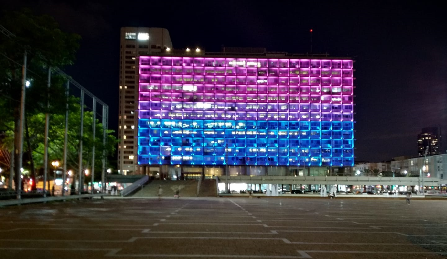 בניין עיריית תל אביב מואר בצבעי דגל הגאווה הביסקסואלי לציון יום הנראות הביסקסואלי, 23 בספטמבר 2019